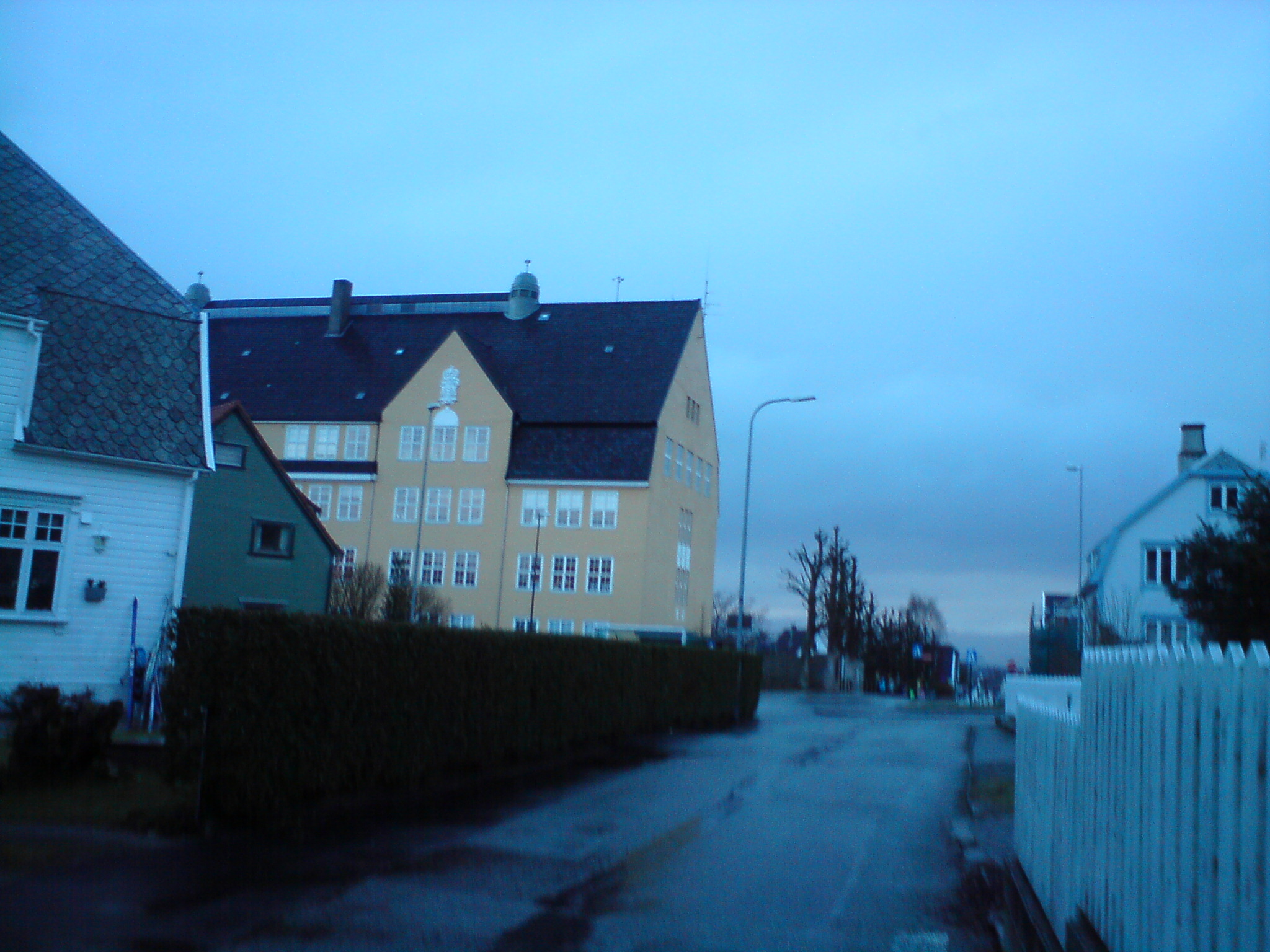 Nylund Skole 1. Mars 2009 sett fra Asbjørn Klosters gate.